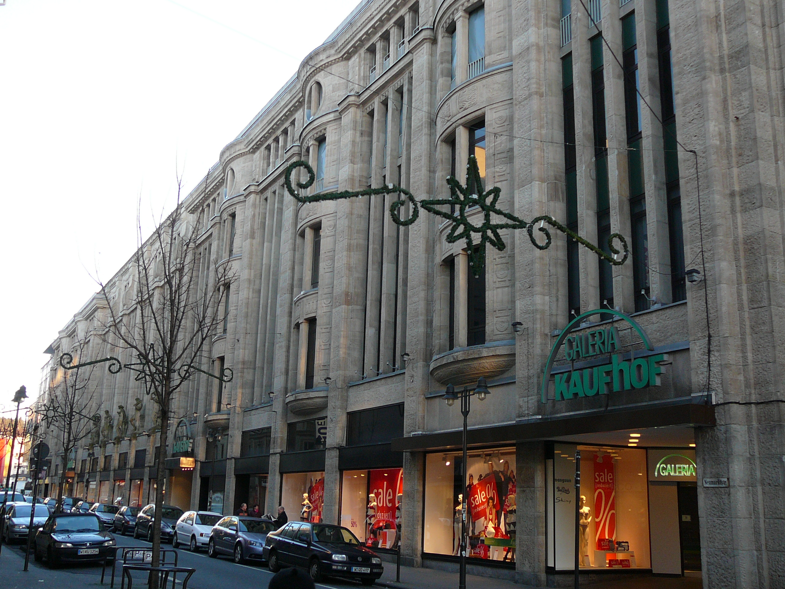 Neumarktstr, Wuppertal